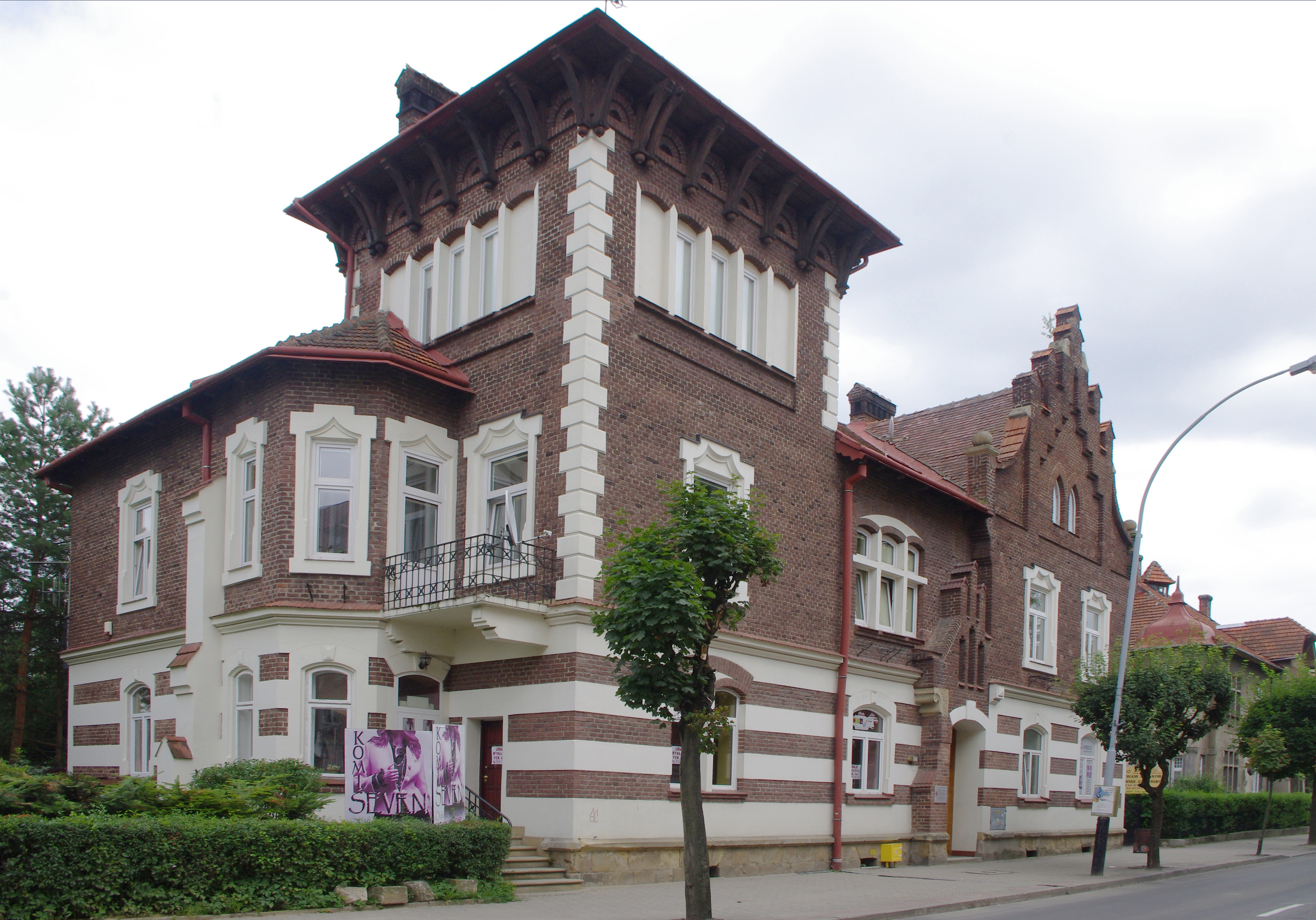 Krosno, ul. Staszica 5 - zespół willi: - willa art. malarza S. Bergmana - ogród przy willi Zabytek nr A-291 z 31.03.1993)